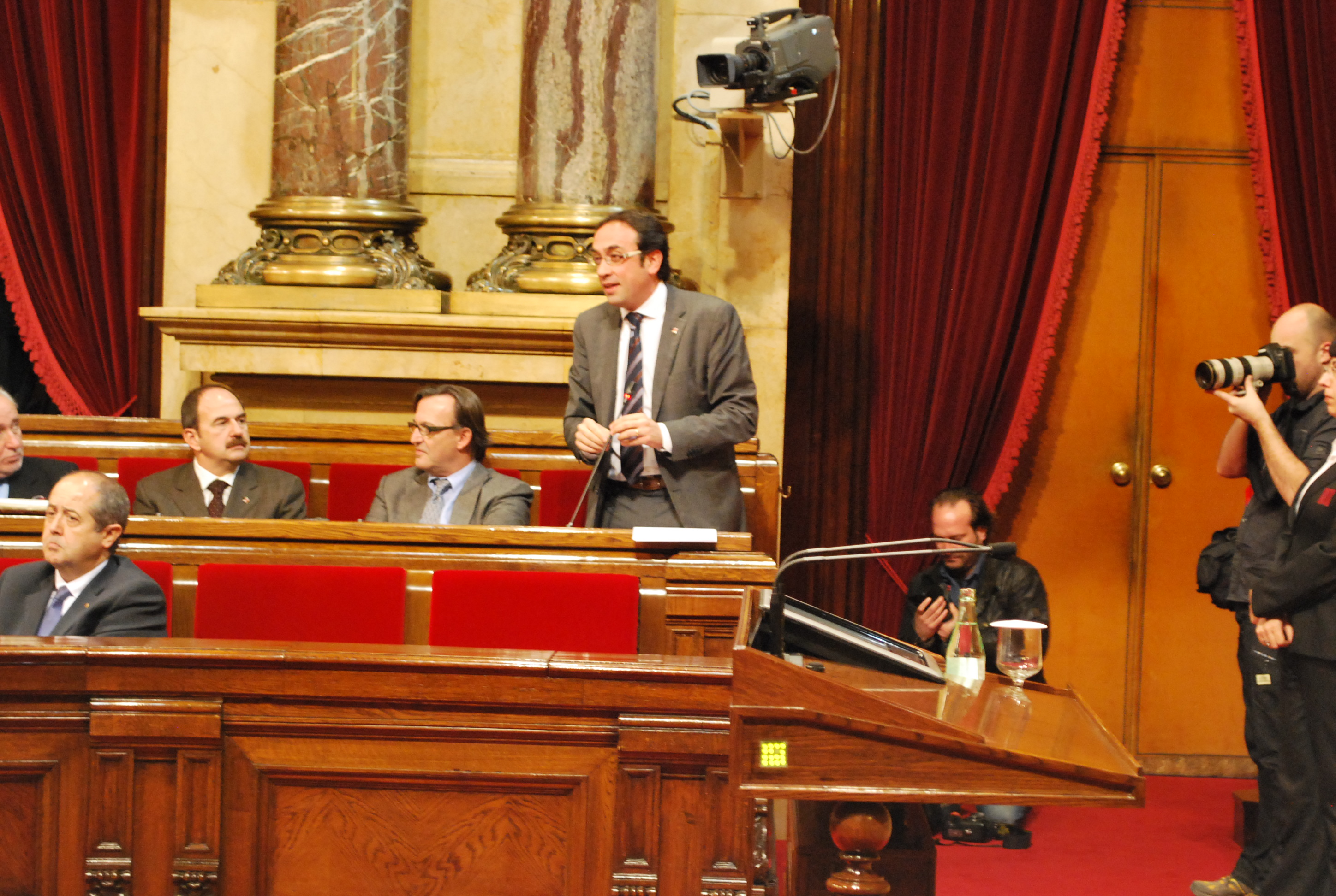 Josep Rull i Andreu a la sessió de control del Govern.